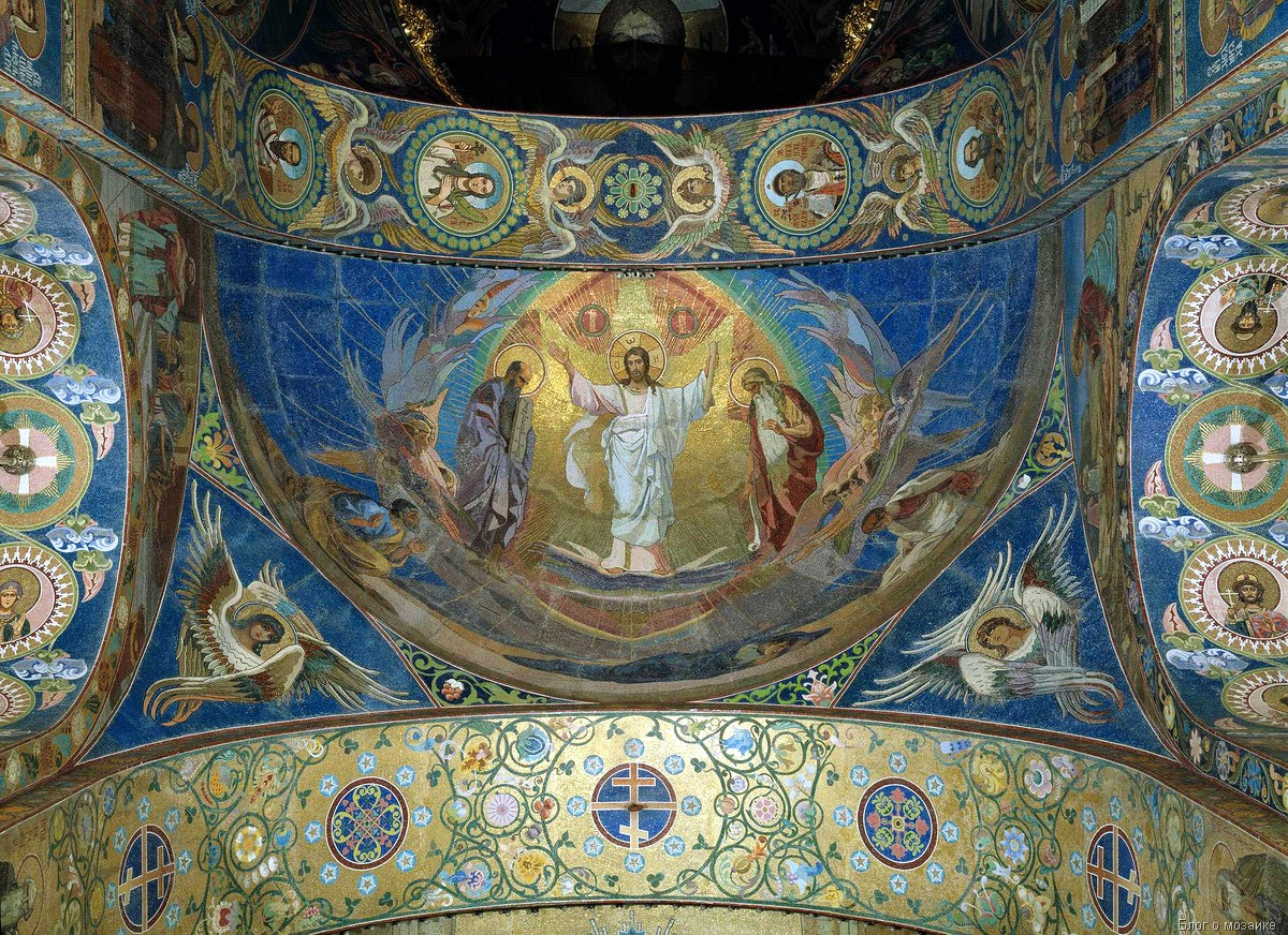 Мозаика по эскизу «Преображение Господне», находится в храме Спаса на Крови.